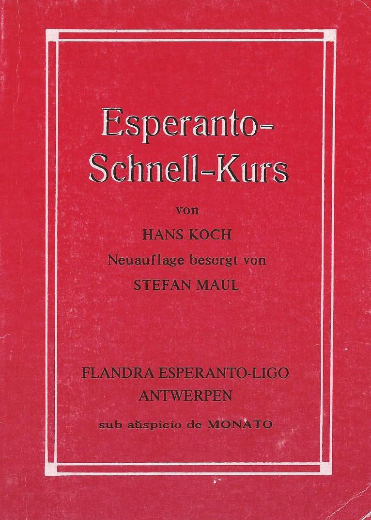 librokovrilo de "Esperanto-Schell-Kurs", 1989